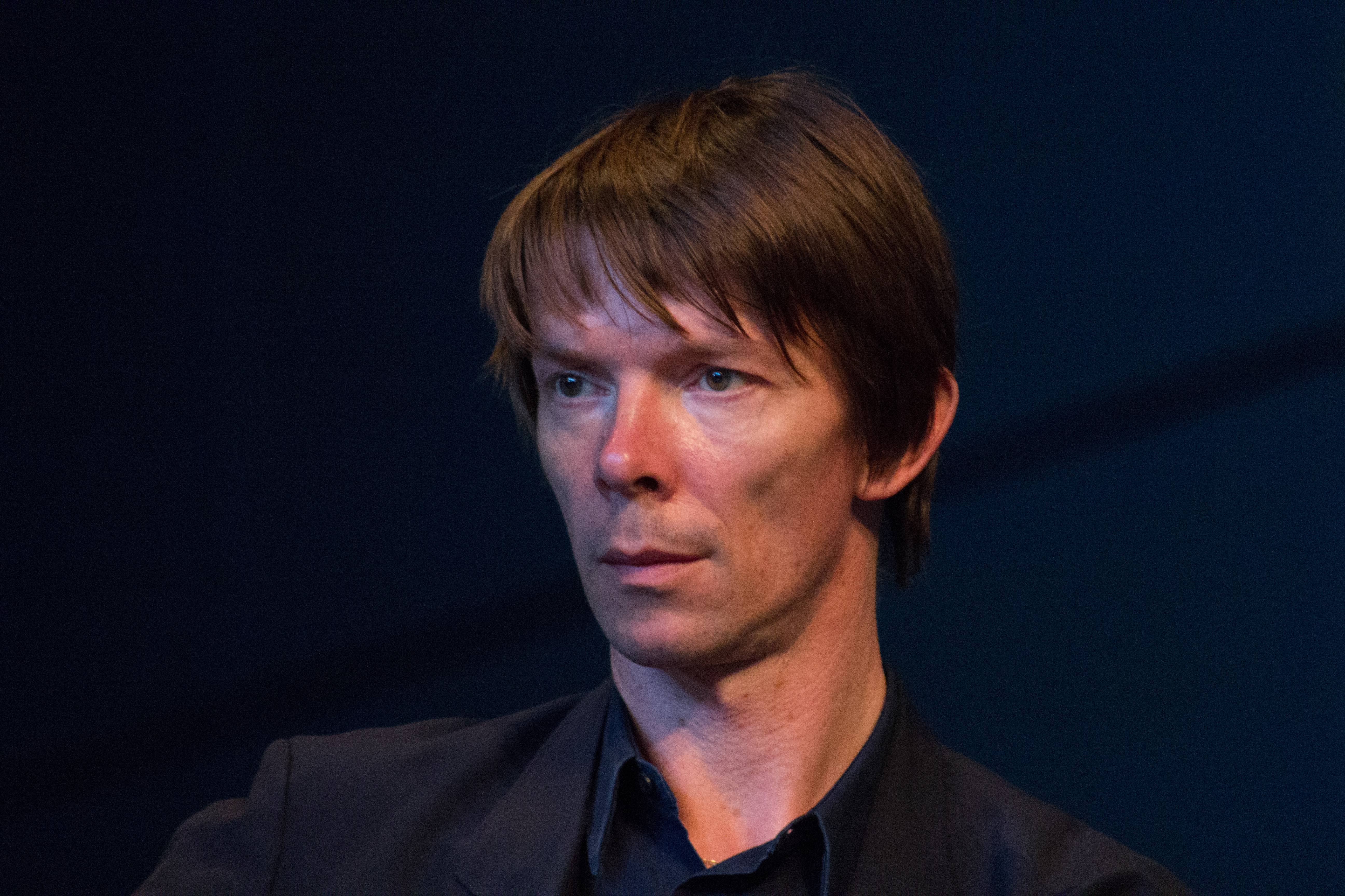 Documenta 14 in Kassel: Adam Szymczyk im Rahmen der Eröffnungskonferenz der Documenta 14 am 7. Juni 2017 in Kassel